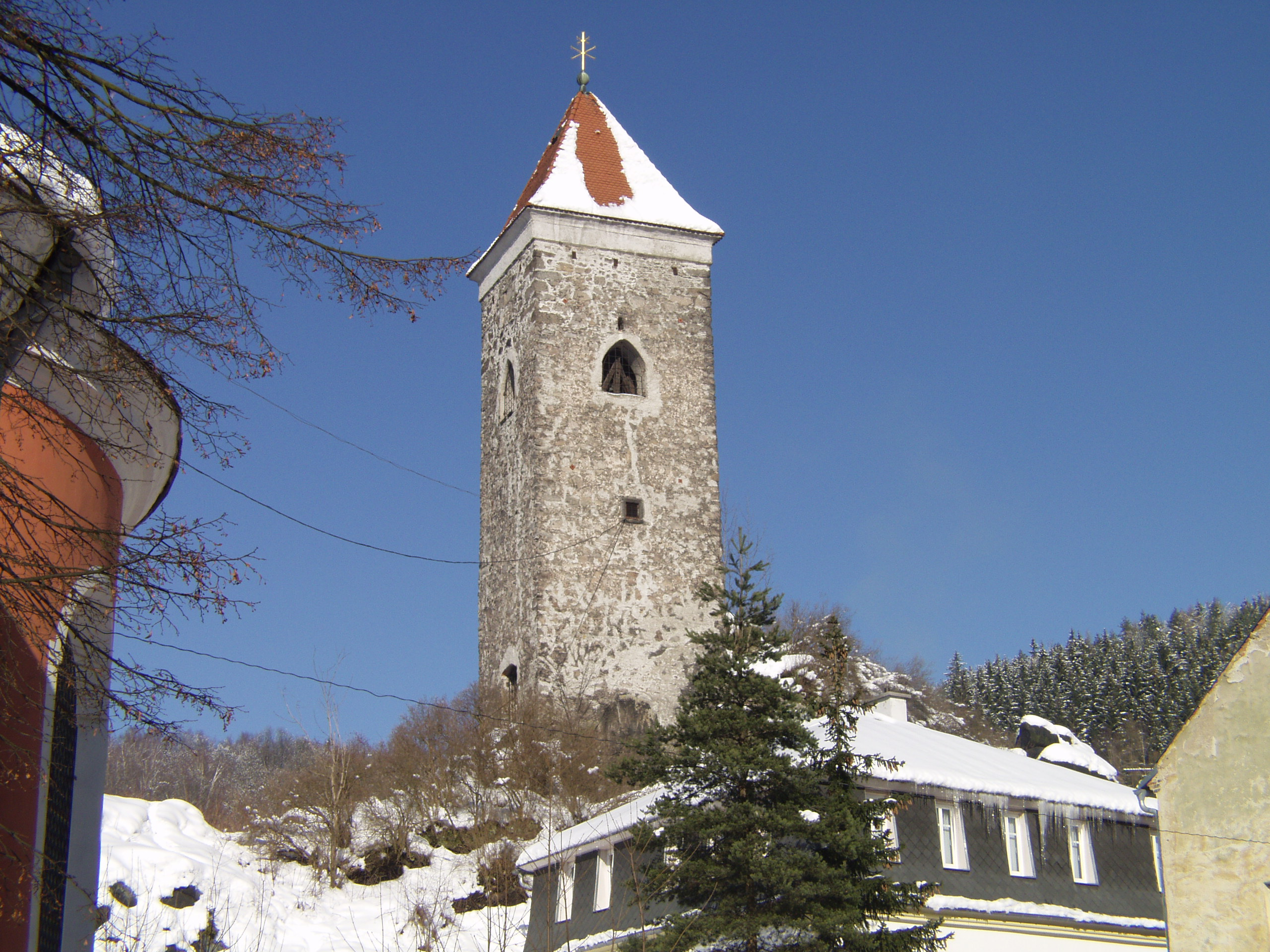 Nejdek - Hrad Černá věž, zřícenina